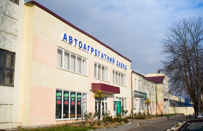 Полтавский автоагрегатный завод, проходная